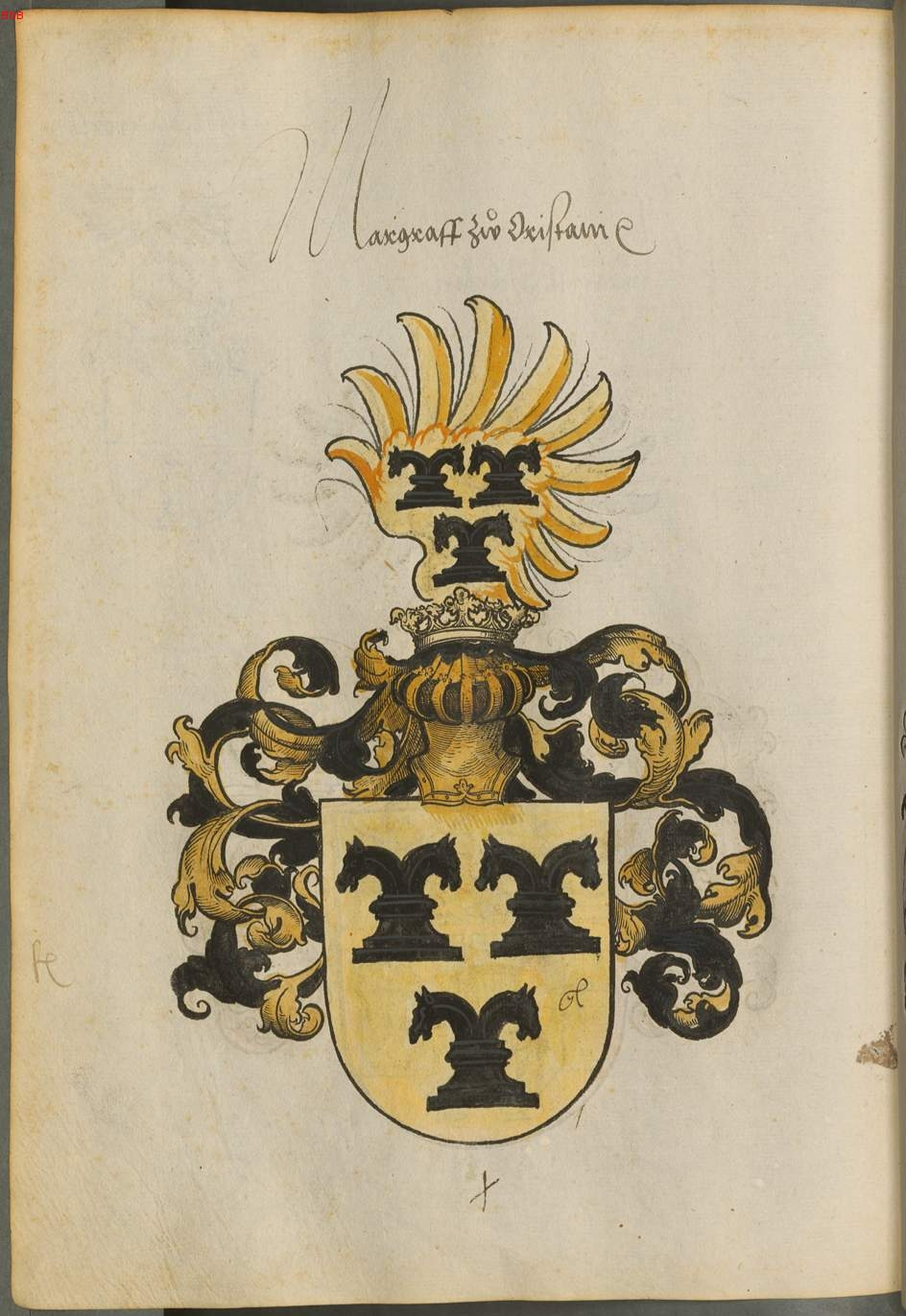 Stemma araldico del Marchesato di Oristano